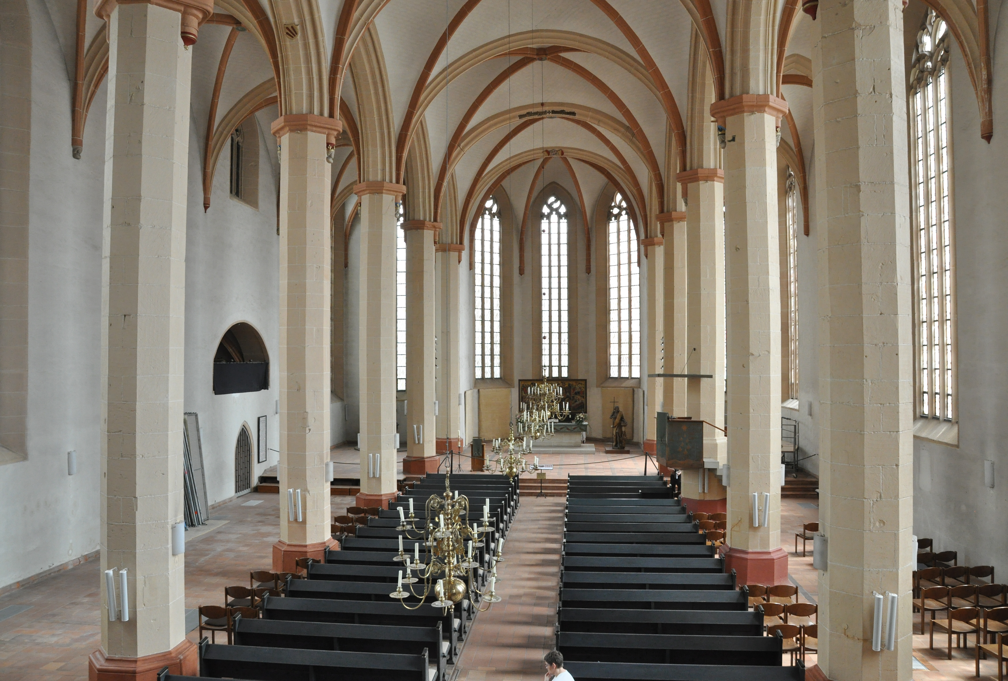 St.-Lamberti-Kirche (Hildesheim), Blick von der Orgelempore durchs Mittelschiff nach Osten